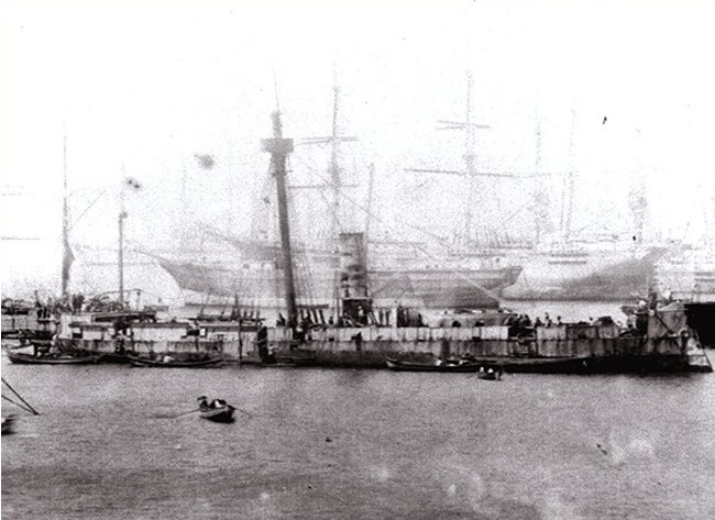 Monitor "Huáscar" entrando al puerto de Valparaíso, luego del Combate Naval de Angamos. 1879